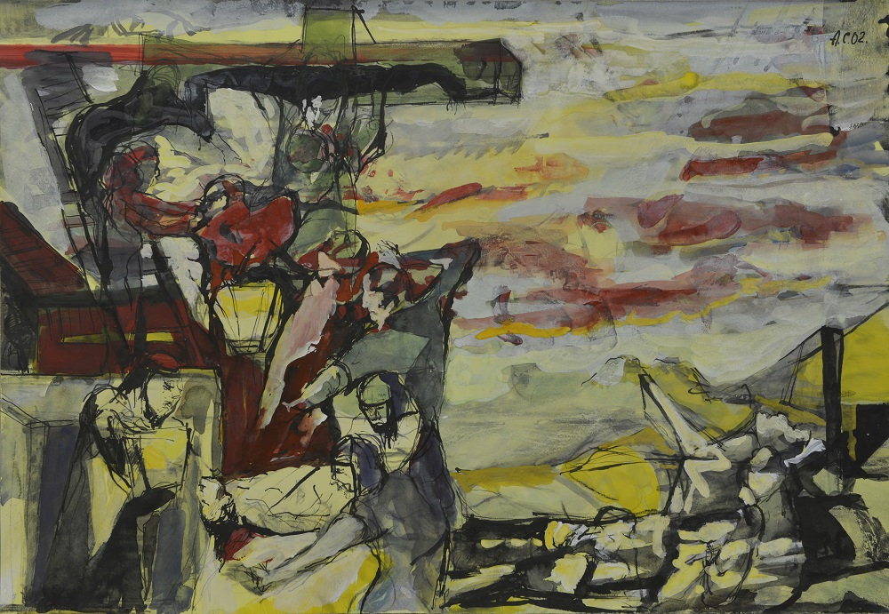 «В Эшерах» из серии «Лезвие». Цветная бумага, акварель, тушь